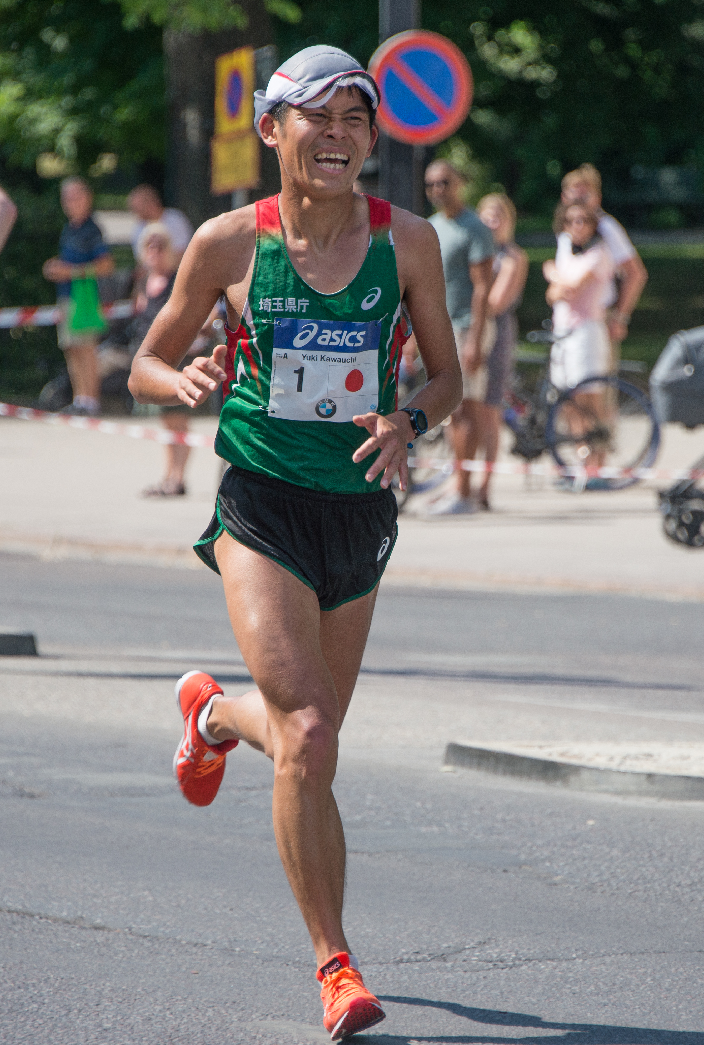 Stockholm Marathon 2018.